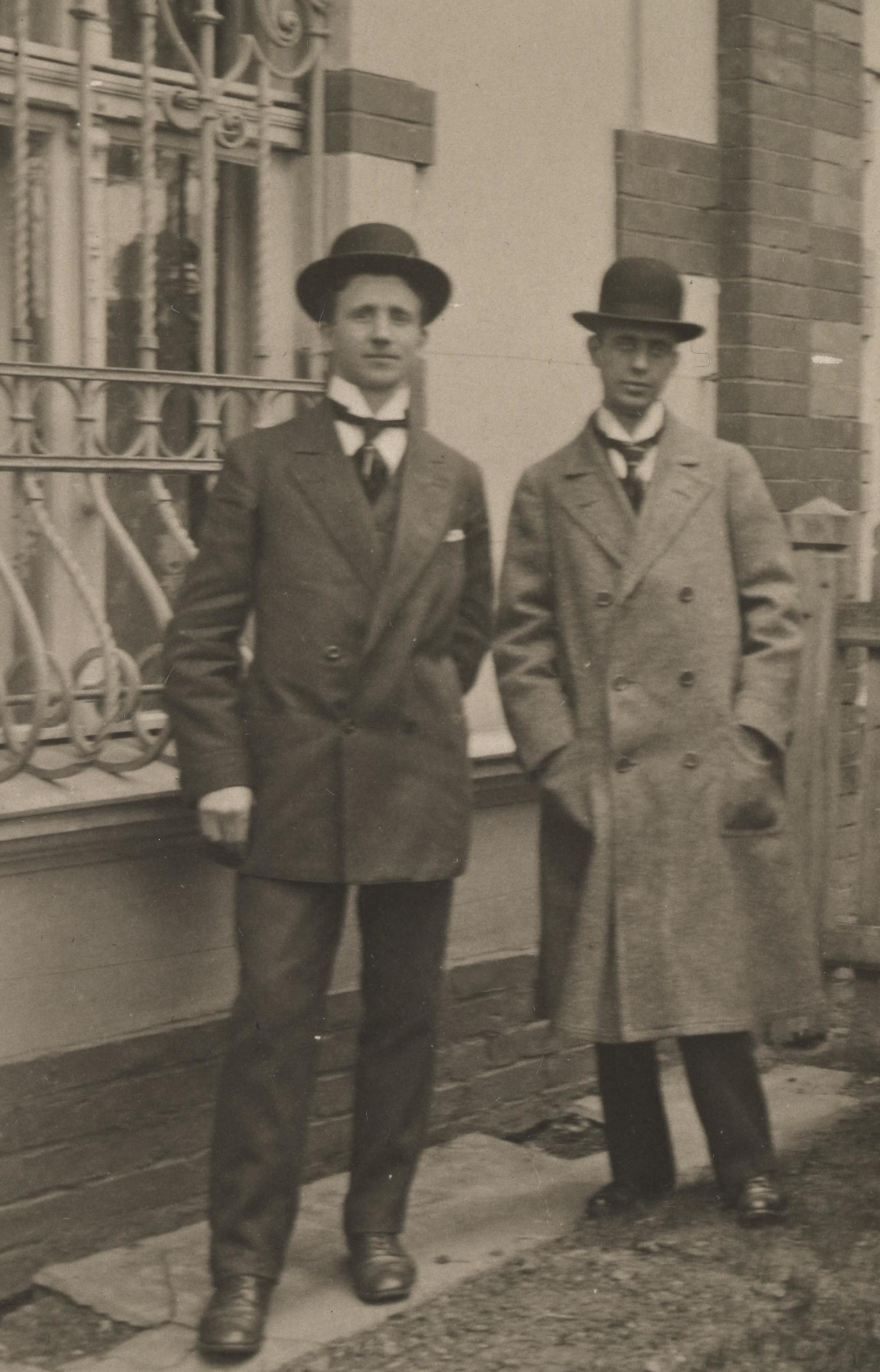 Bildet er hentet fra Nasjonalbibliotekets bildesamling Depicted people: Valen, Fartein and Mohr, Hugo Lous